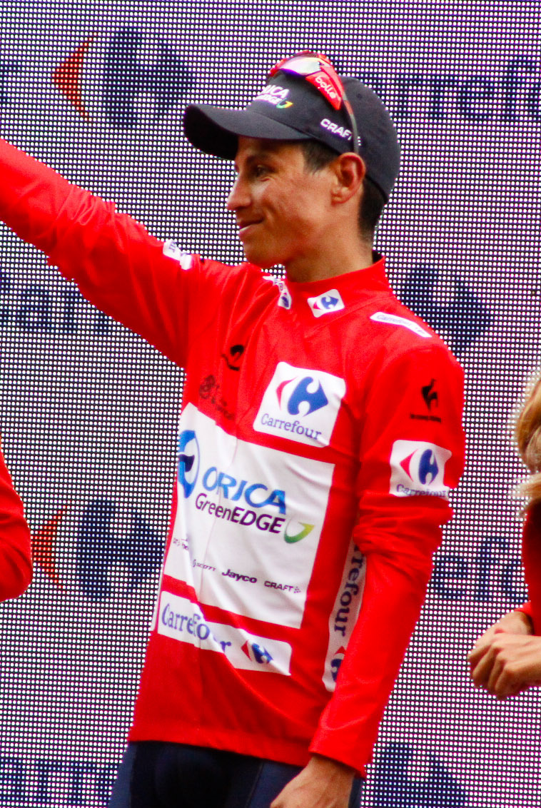 Vuelta a España 2015 | 8ª Etapa Puebla de Don Fadrique - Murcia-92